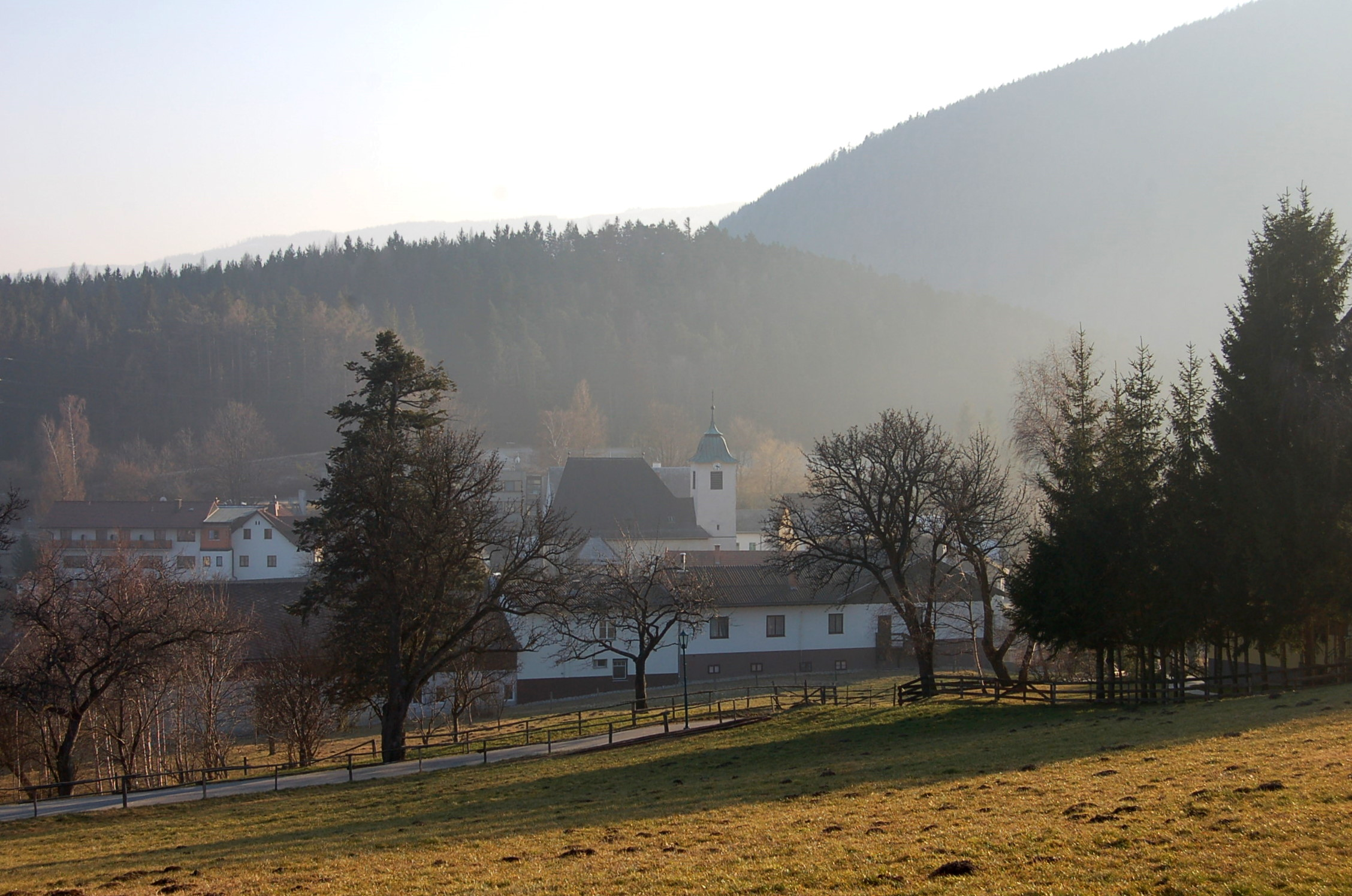 Raach am Hochgebirge, Niederösterreich/Lower Austria